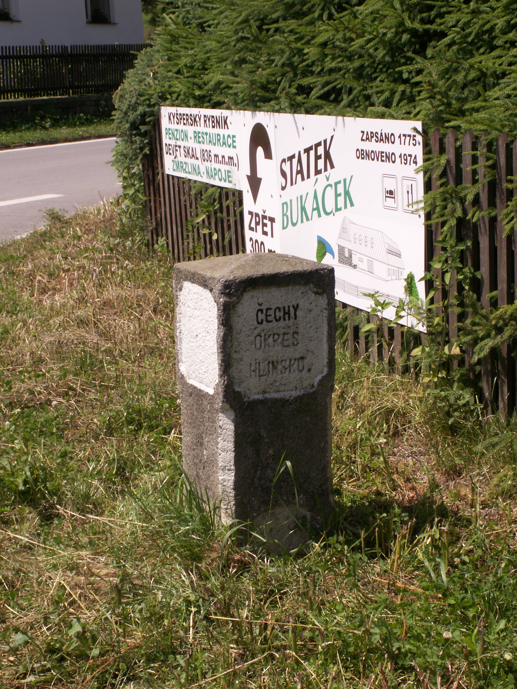 hraniční kámen Čechy - Morava, Křižánky, okres Žďár nad Sázavou